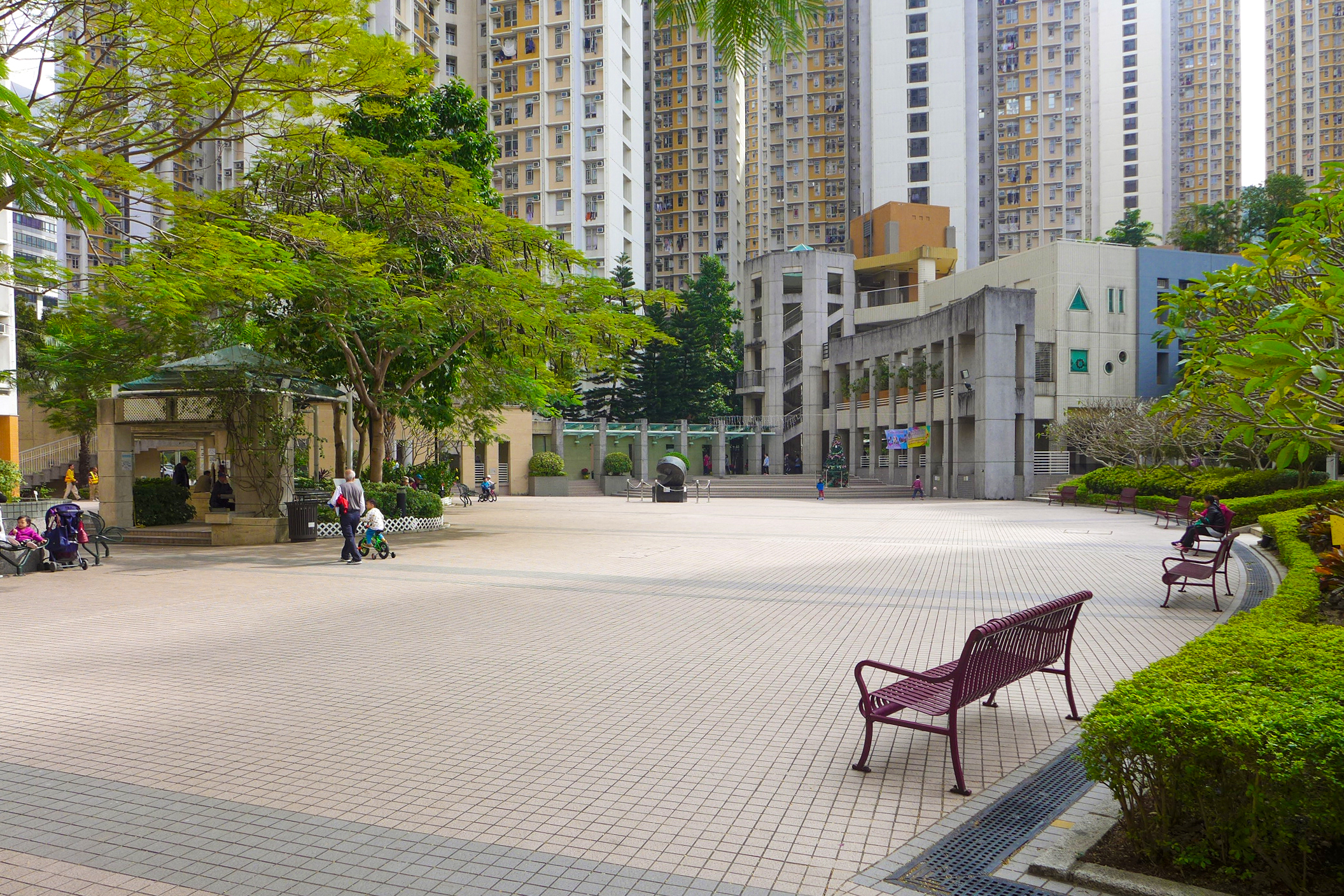 Yu Chui Court Plaza